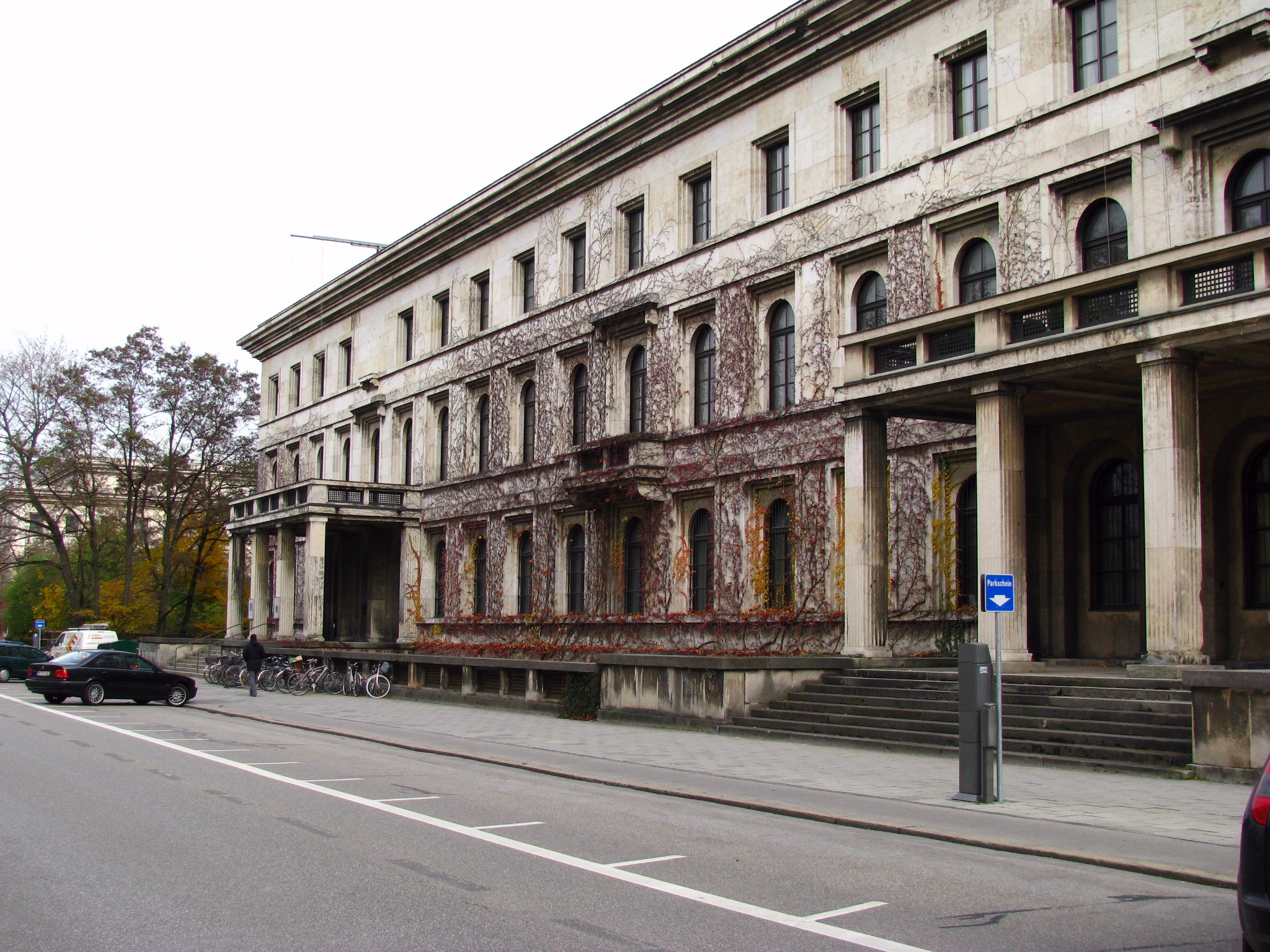 Das Haus der Kulturinstitute in der Meiserstraße 10 in München